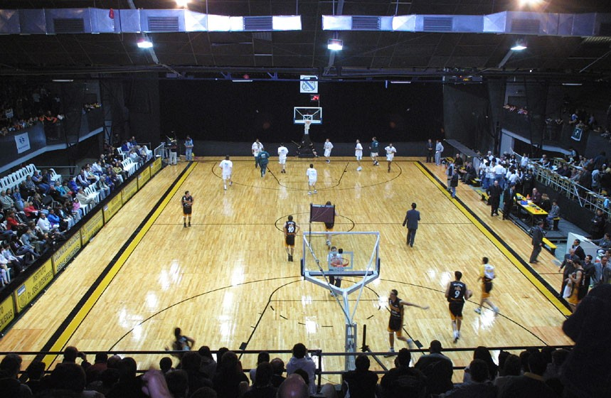 Club Obras Sanitarias' court